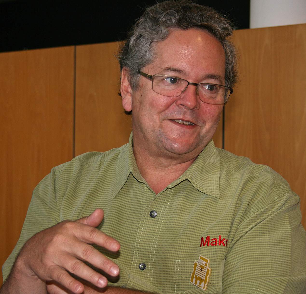 Dale Dougherty, fondateur du magazine Make, à la Mini Maker Faire de Saint-Malo le 12 octobre 2013.